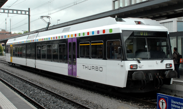 GTW 686-1, ex Mittelthurgaubahn nu Thurbo op 23 juni 2009 te Weinfelden